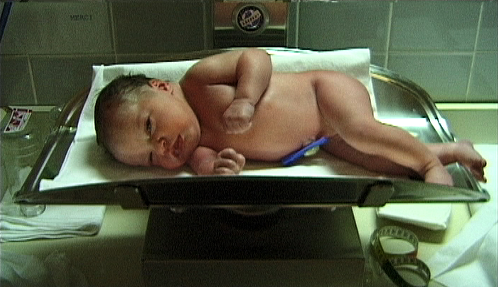 Image tirée de « Collection Premier Jour » de Fernand Melgar.